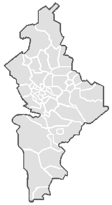 División política del estado mexicano de Nuevo León.